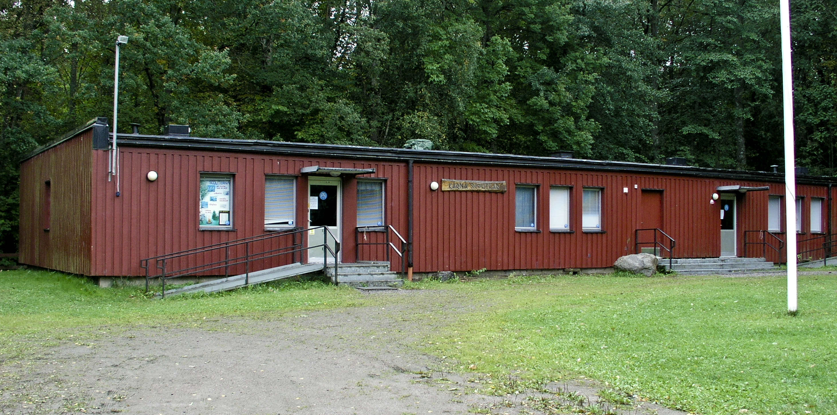 Kärna mosse naturreservat, scoutstugan vid källdammen. Malmslätt, Linköping, Sverige.